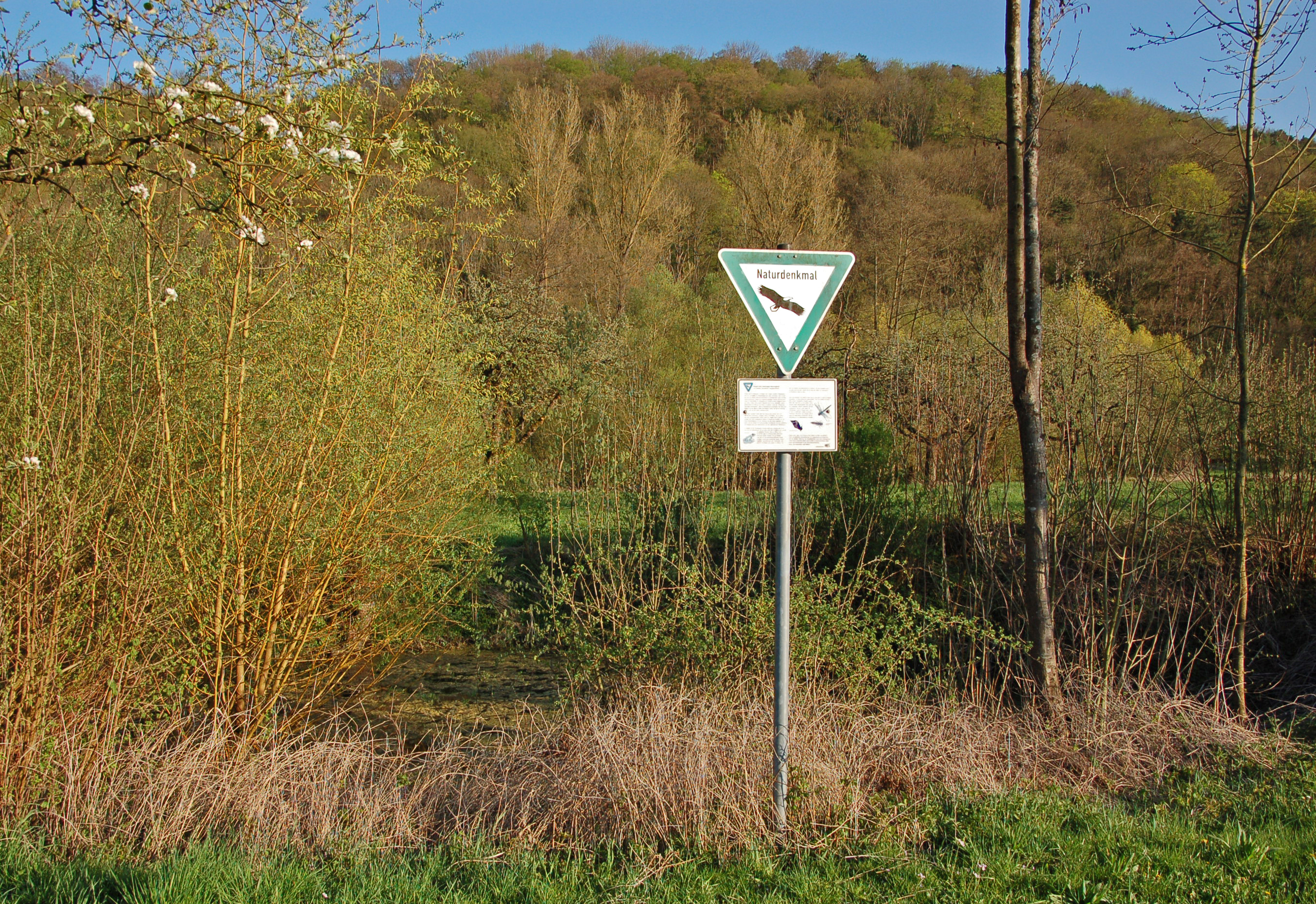 Tümpel beim Remminger Siedlungsplatz in der Enzaue. Naturdenkmal „Tümpel beim ehem. Remmigheim“